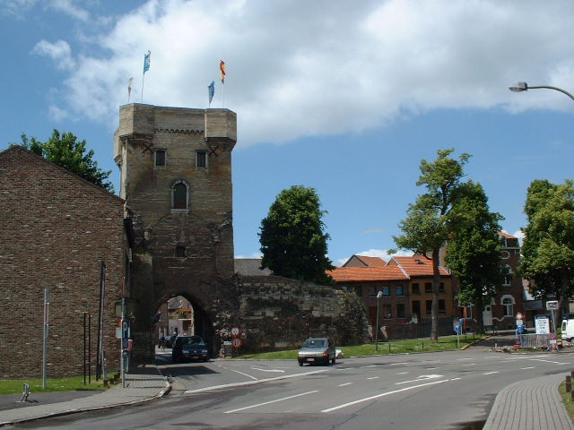 Tongeren